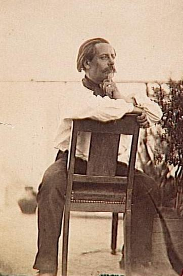 Charles Marville (1816-1879), französischer Fotograf. Selbstporträt.